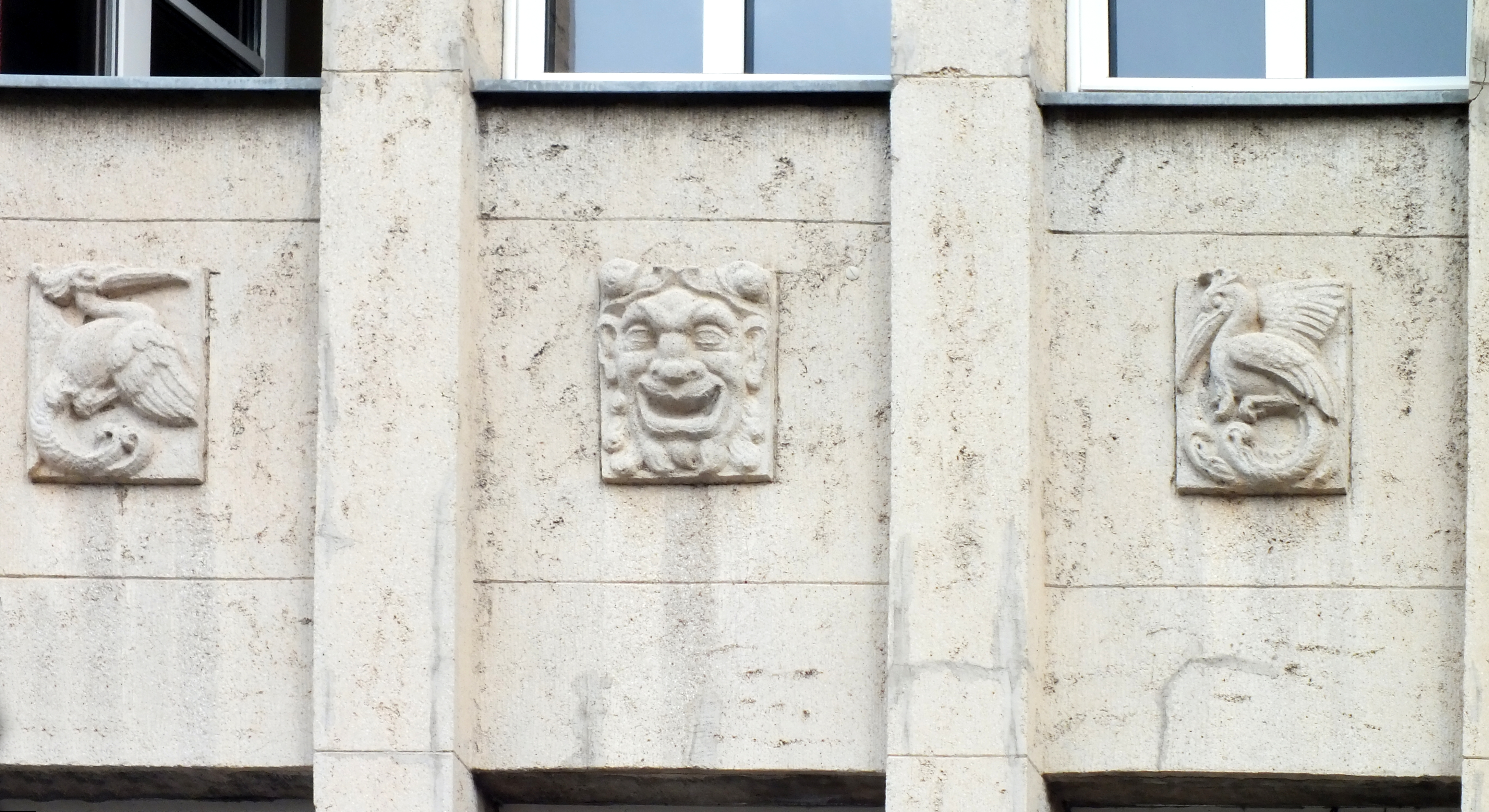 Aue in Sachsen, Bahnhofstraße, Kaufhaus Weichhold